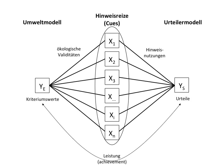 Schematische Darstellung des "Linsenmodells" nach Egon Brunswik